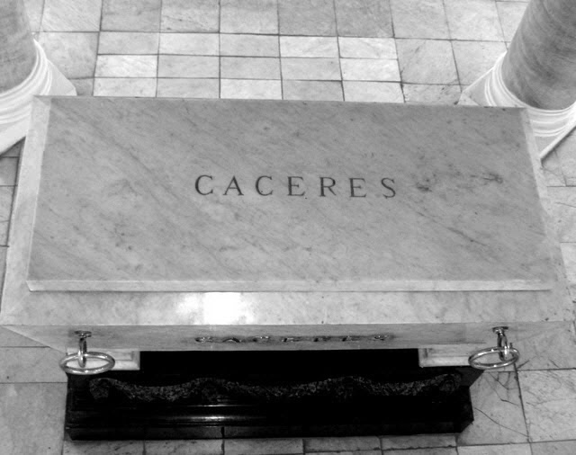 La Tumba de Andres Avelino Cacéres